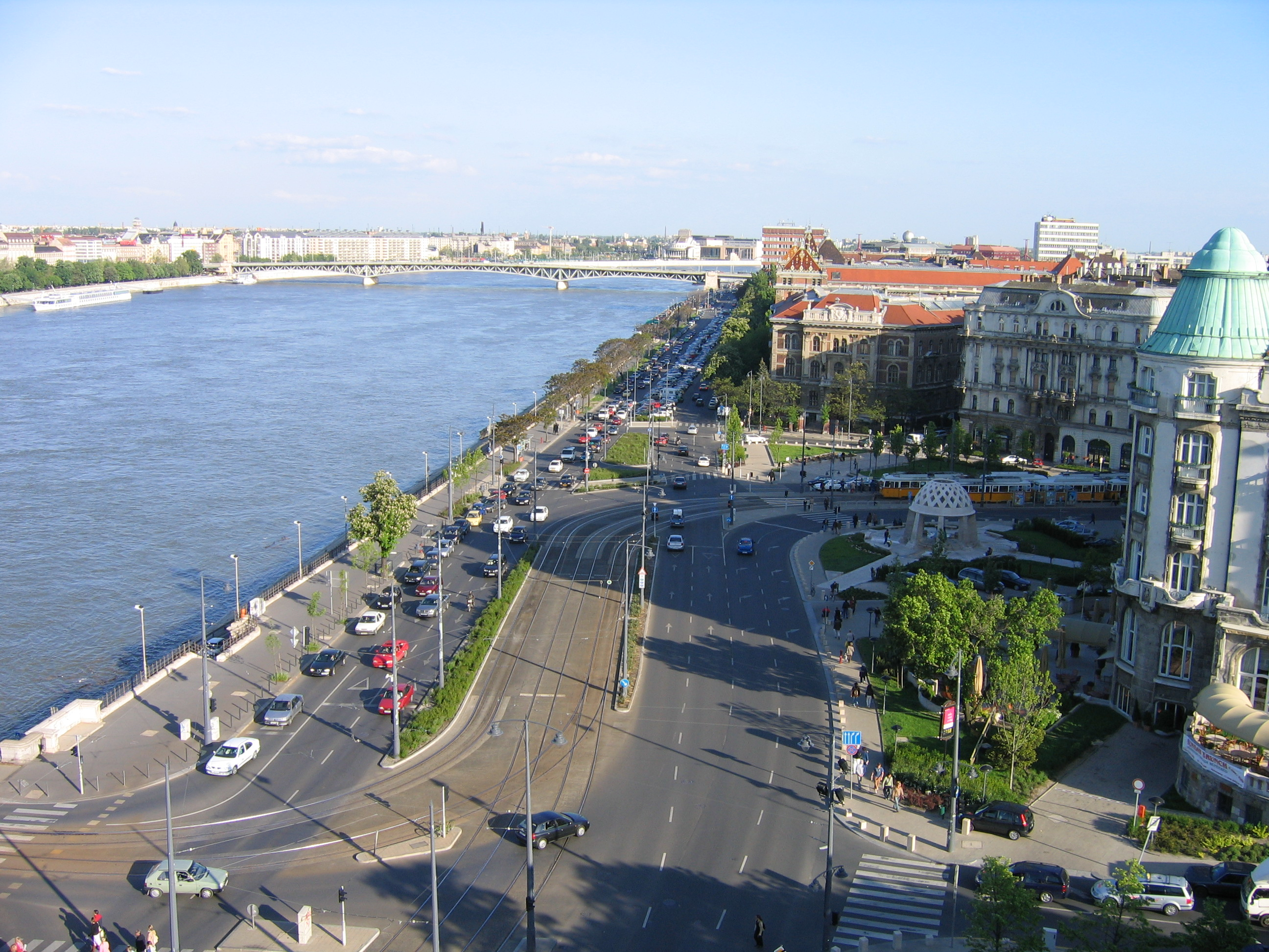 Szent Gellért tér, Budapest, Hungary